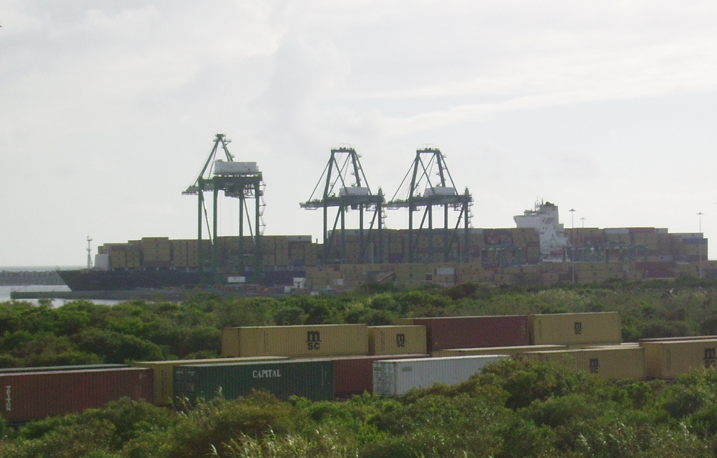 Terminal de contentores do Porto de Sines, término da linha.